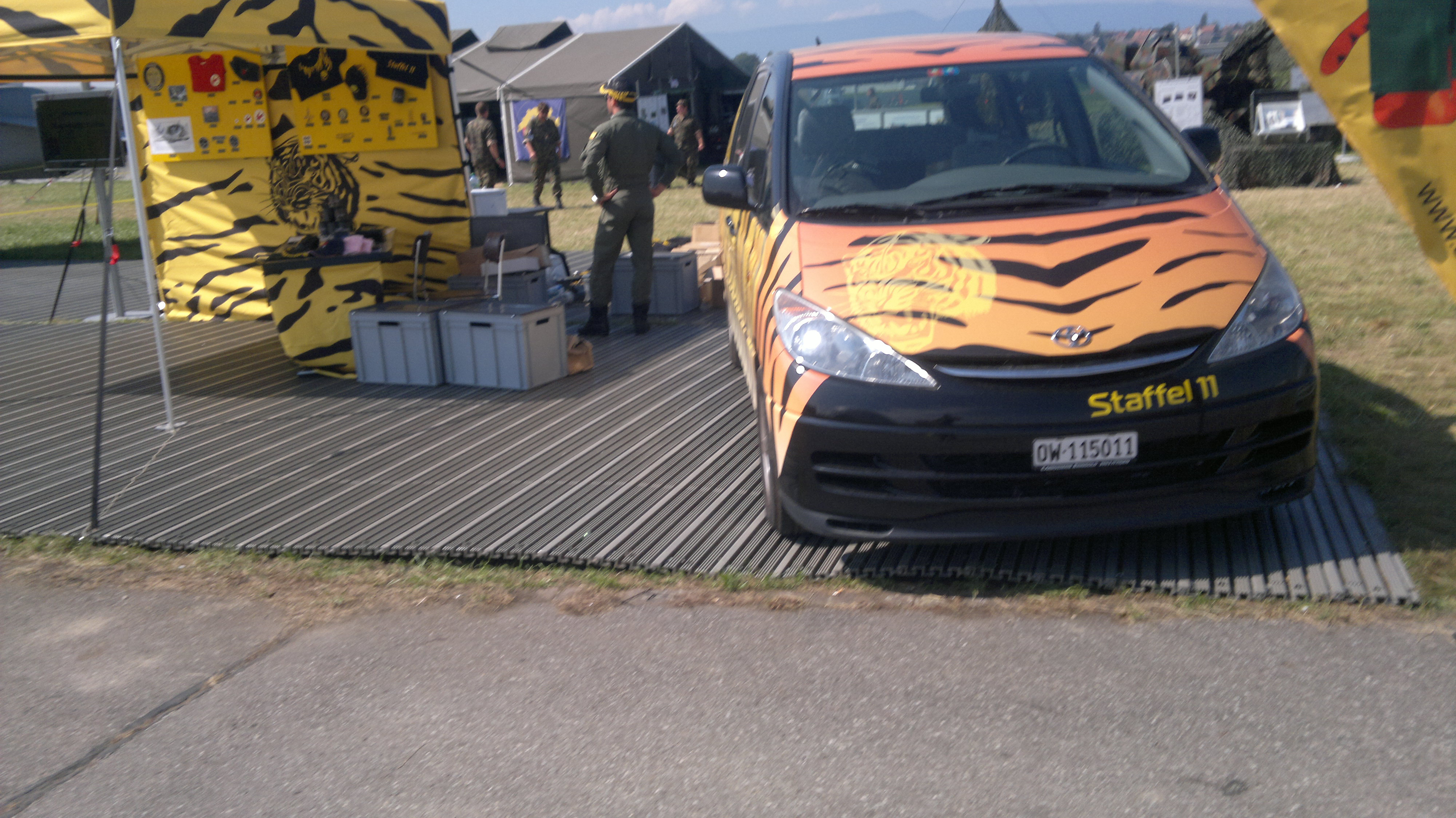 Fliegerstaffel 11 Auto